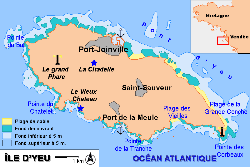 Description : Carte sommaire l'ile d'Yeu Date : 2006 Lieu : Ile d'Yeu, Vendée, France Réalisation : Pline